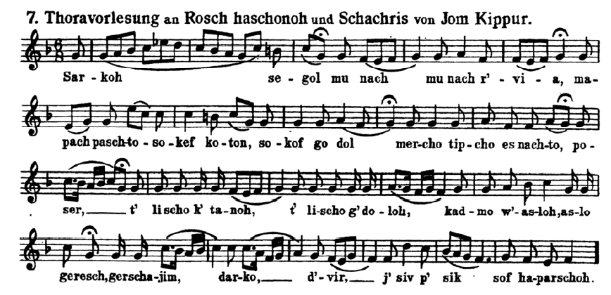 Ausschnitt aus S. 87 von Die gottesdienstlichen Gesänge der Israeliten für das ganze Jahr, Frankfurt 1912